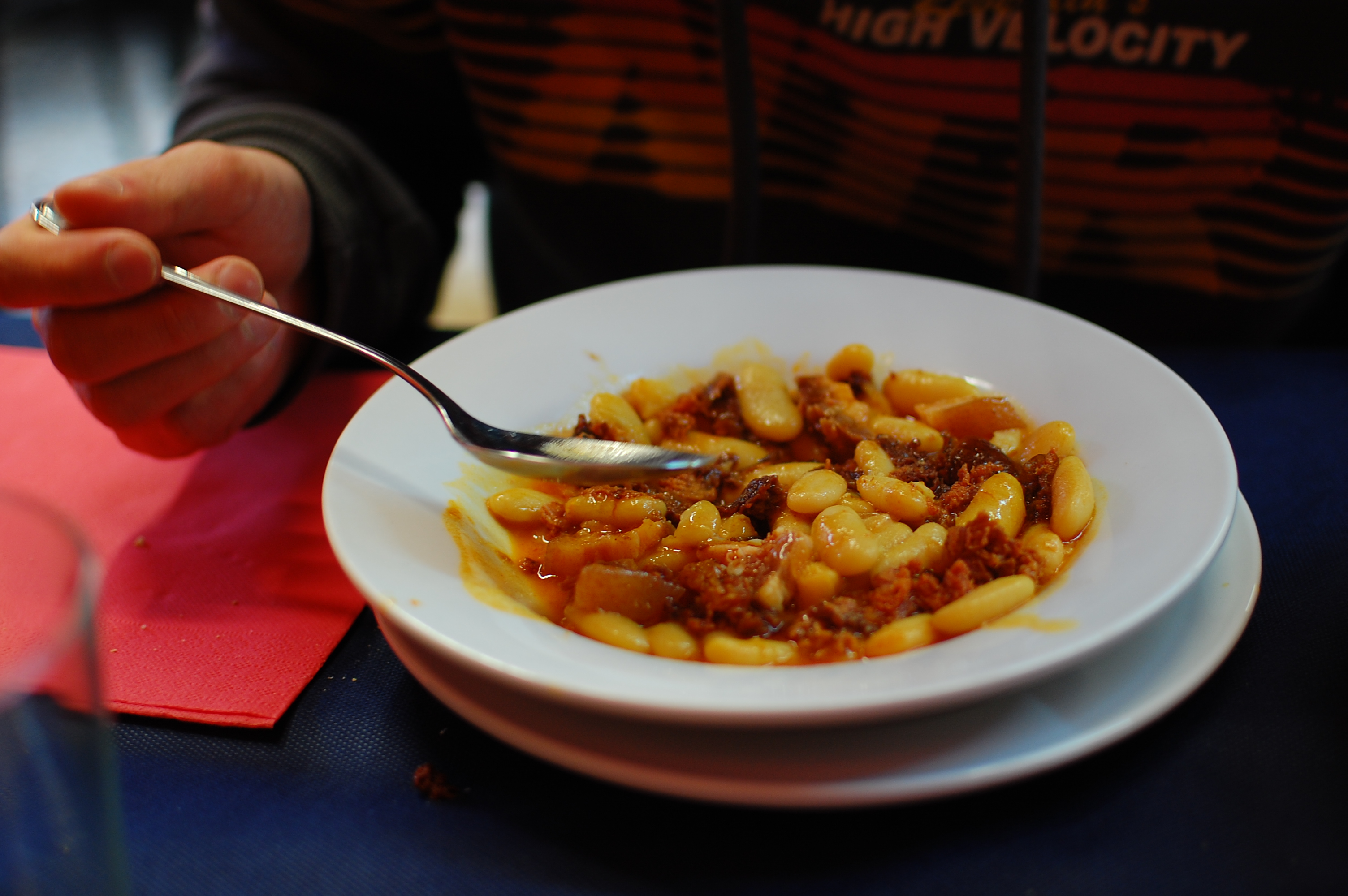 Comiendo un plato de fabada.